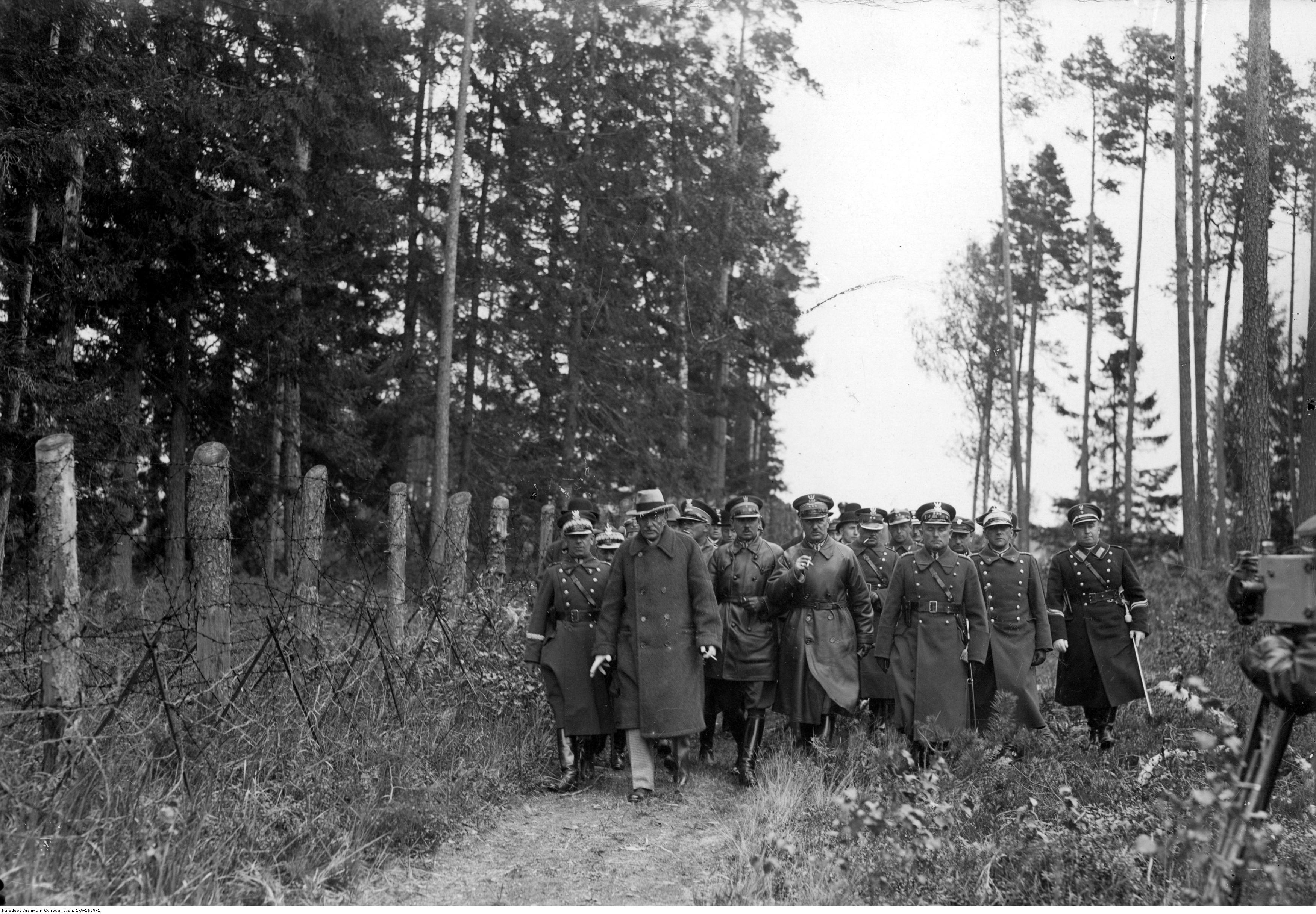 Wizyta prezydenta RP Ignacego Mościckiego na kresach wschodnich - pobyt w Borkowszczyżnie k. Wilna. Prezydent RP Ignacy Mościcki (I rząd 2. z lewej) na strażnicy Korpusu Ochrony Pogranicza. Widoczni m.in.: gen. Mieczysław Norwid-Neugebauer (1. z lewej), adiutant prezydenta RP major Kazimierz Jurgielewicz (I rząd 3. z lewej), adiutant prezydenta RP rtm. Wacław Calewski (za prezydentem, z papierosem), szef Gabinetu Wojskowego Prezydenta RP pułkownik Jan Głogowski (I rząd 4. z lewej). Koncern Ilustrowany Kurier Codzienny - Archiwum Ilustracji